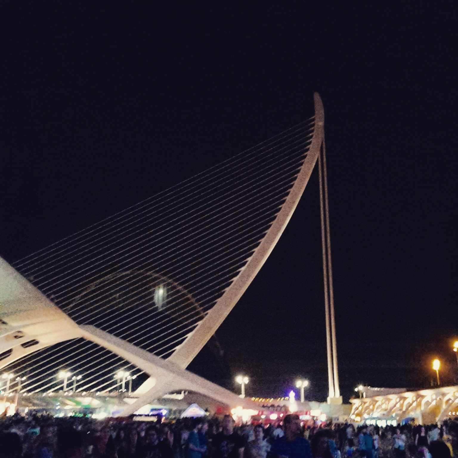 Festival de les Arts Vol.2 por la noche.